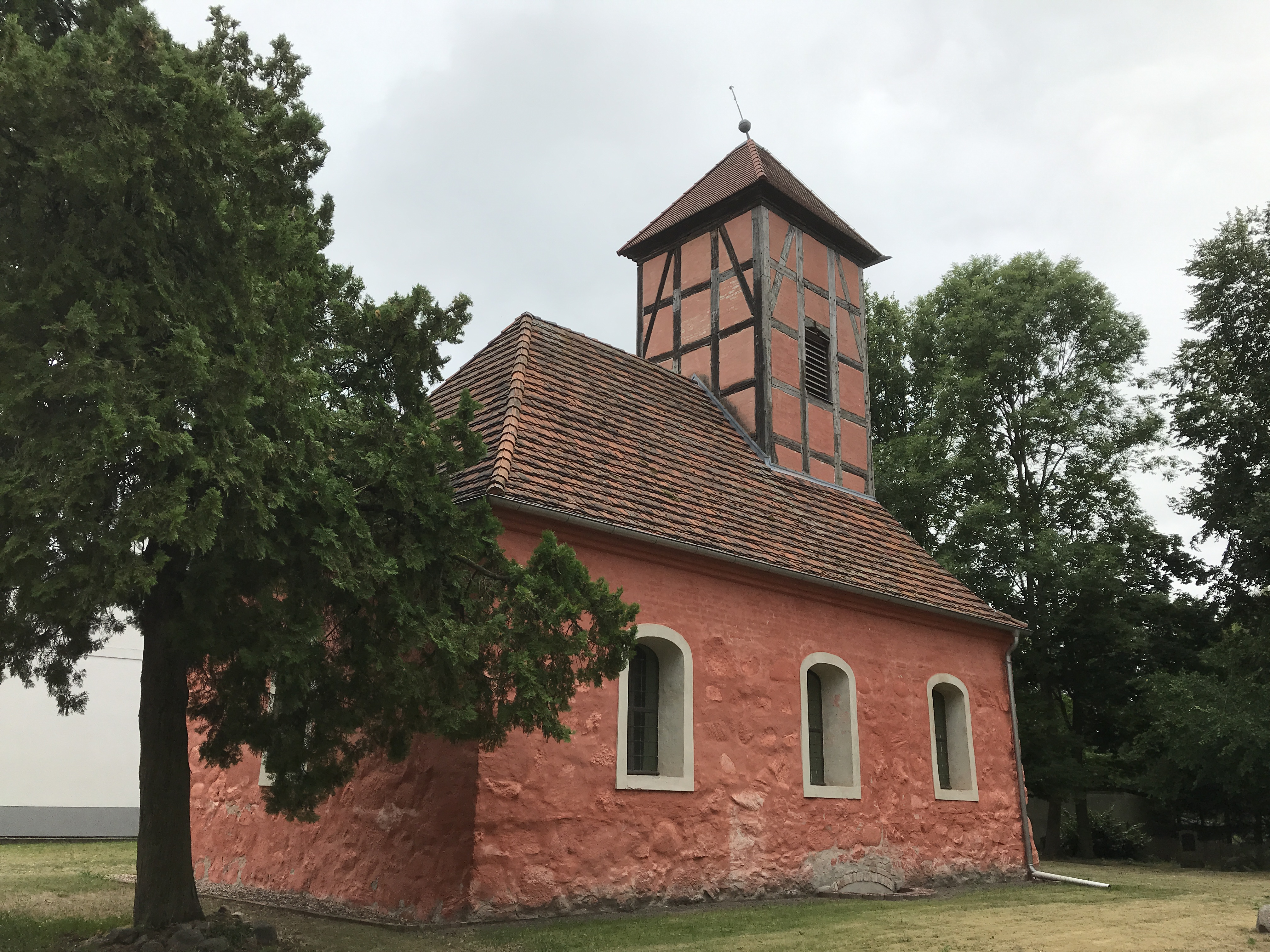 Die Dorfkirche in Kemnitz ist eine spätgotische Feldsteinkirche, die nach einem Brand in den Jahren 1755 bis 1756 erneuert wurde. Im Innern steht unter anderem ein Kanzelaltar aus dieser Zeit.